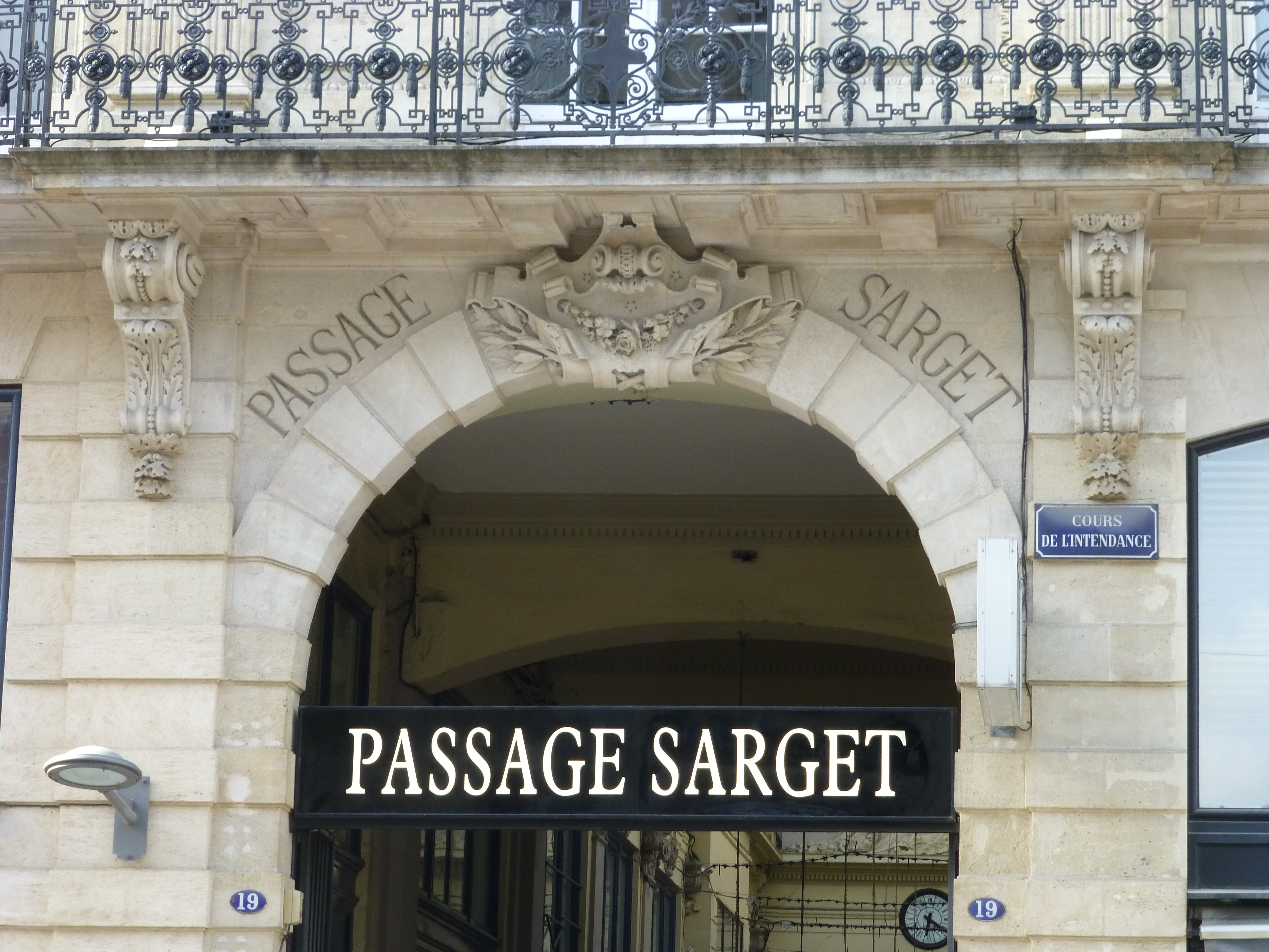 Bordeaux, Passage Sarget.